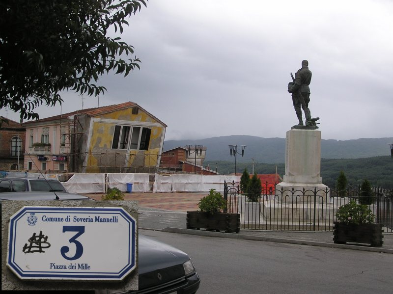 Soveria Mannelli Piazza dei Mille e La Casa pendente (Foto di Luigino C.)